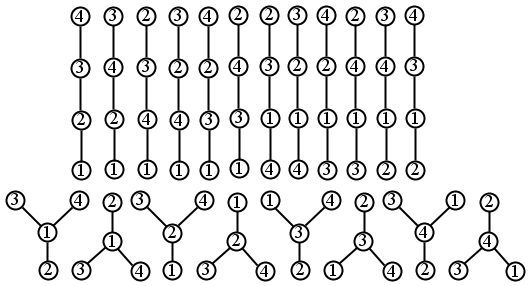 les 20 arbres planaires étiquetés de 4 noeuds